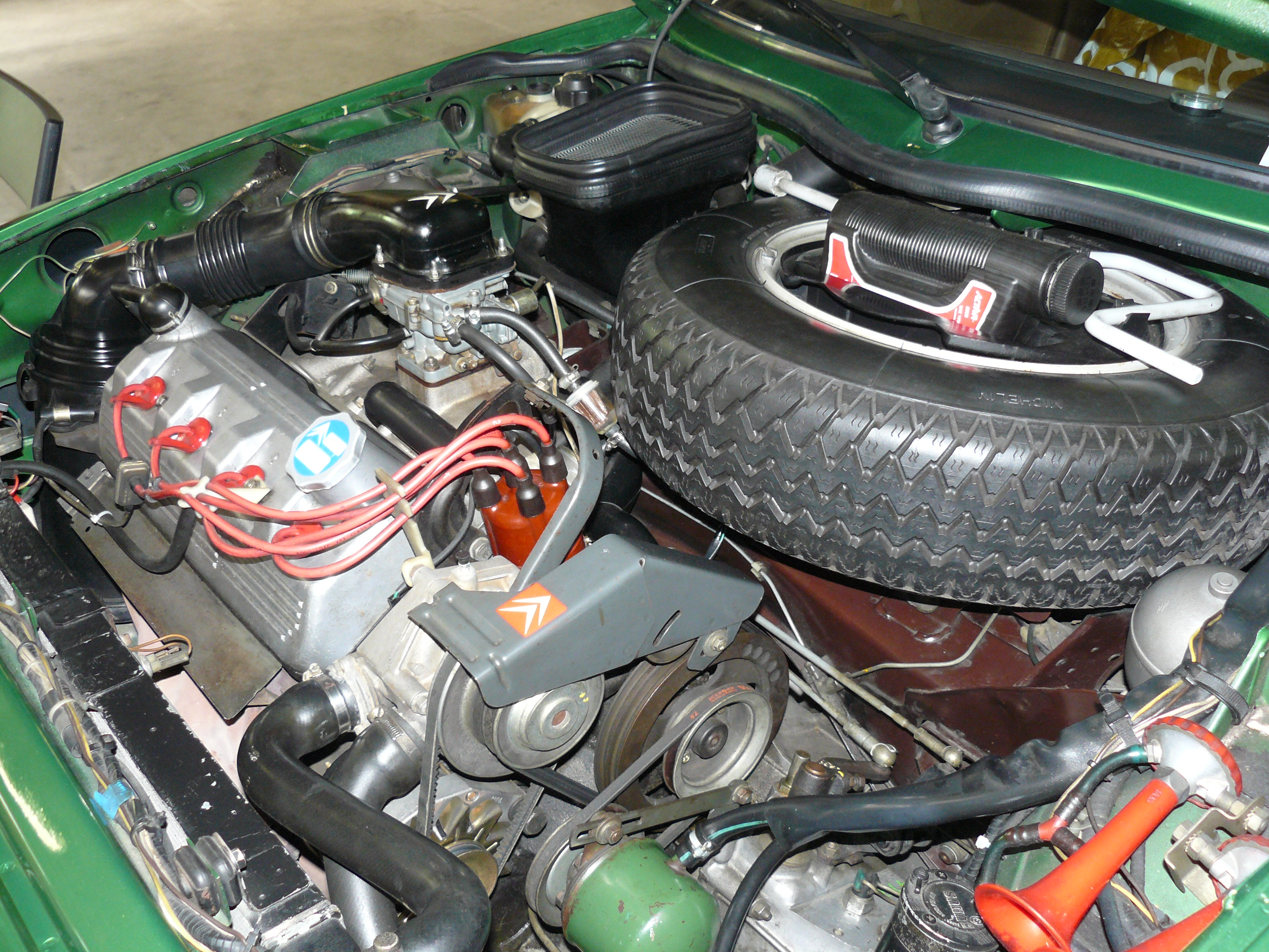 Automedon 2012. Noter la roue de secours de dimension normale à l'avant, sous le capot.